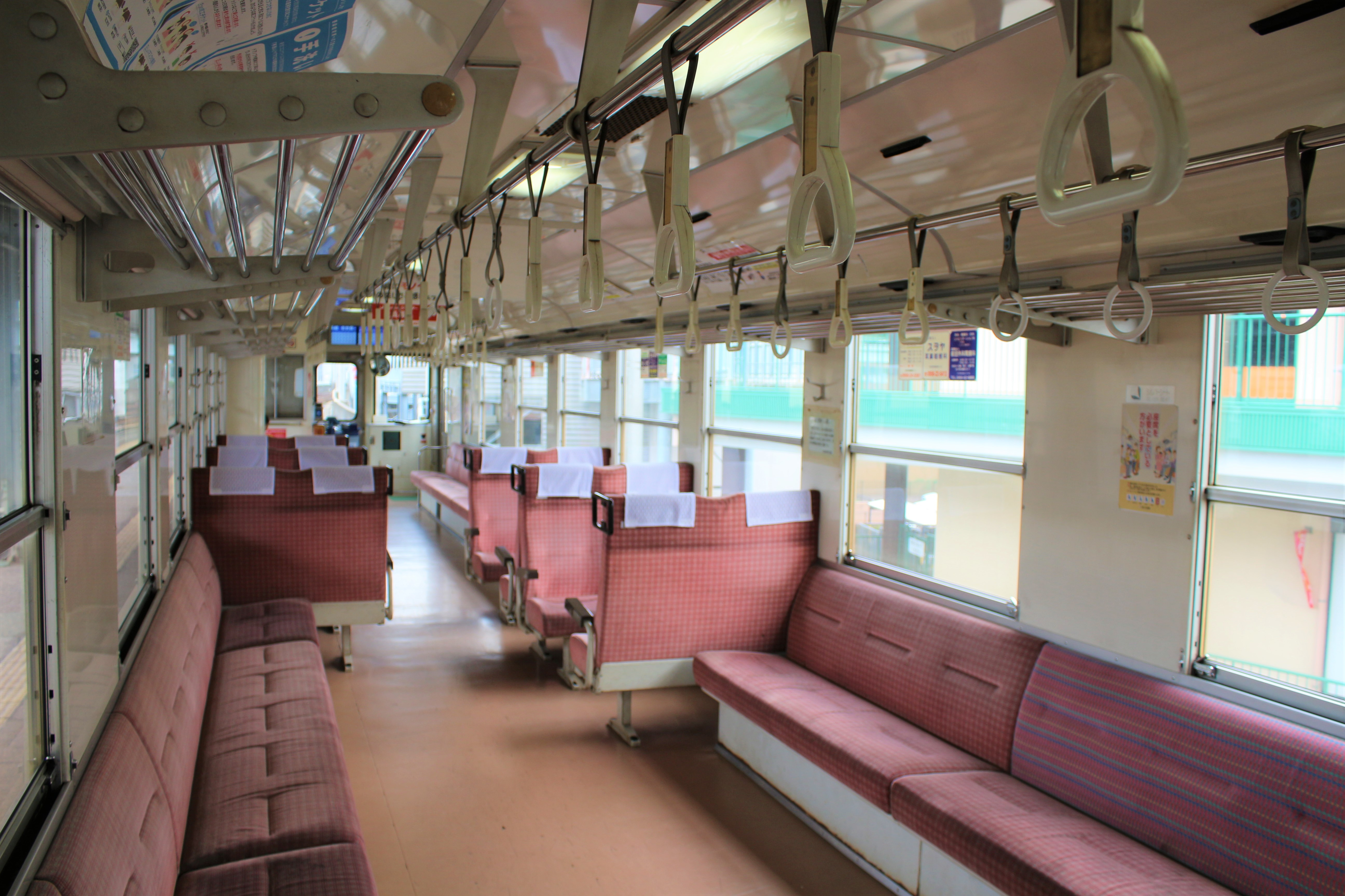 松浦鉄道MR-400形気動車401車内 Canon EOS Kiss X7i